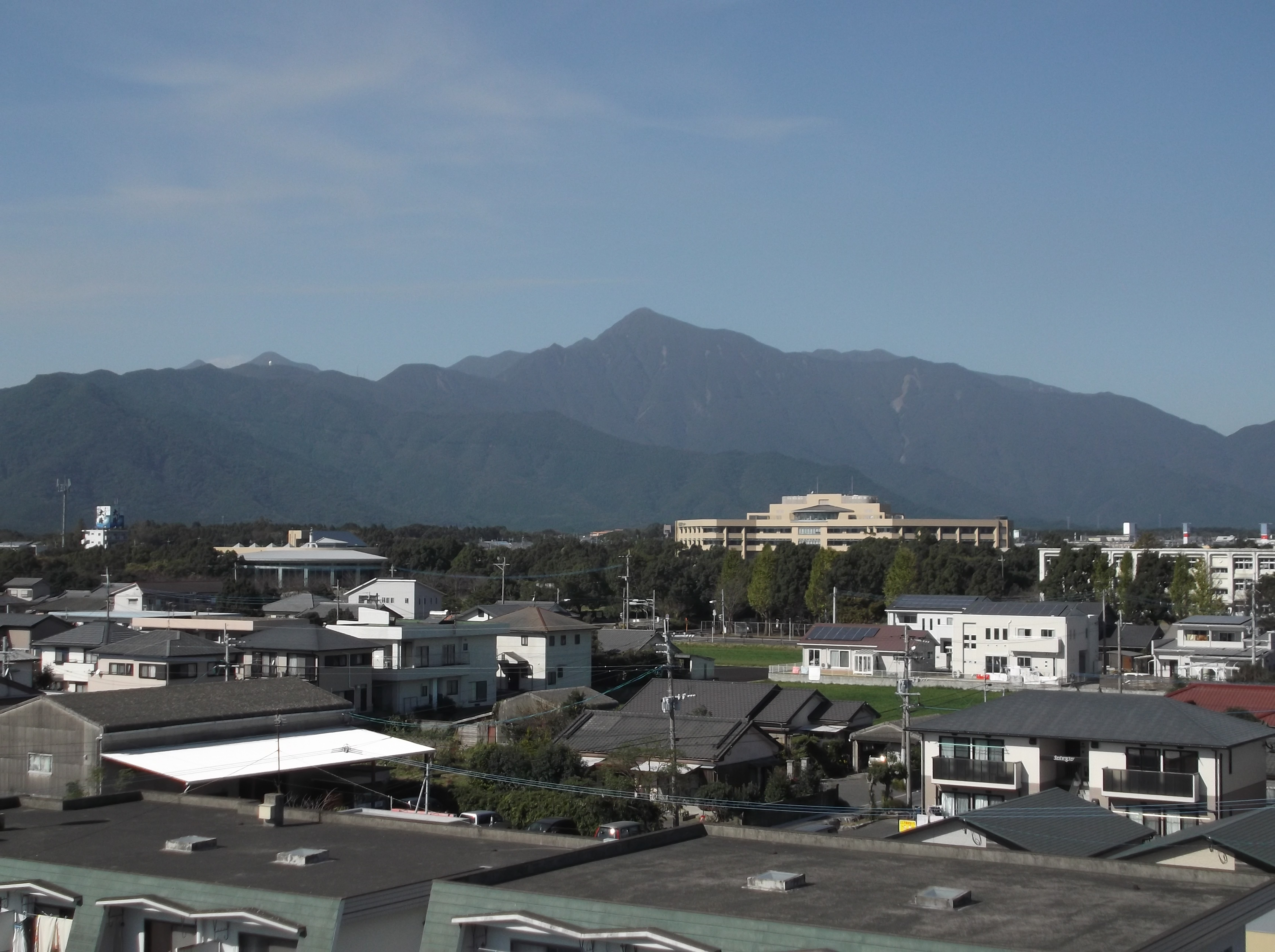 高隈と健康プラザ